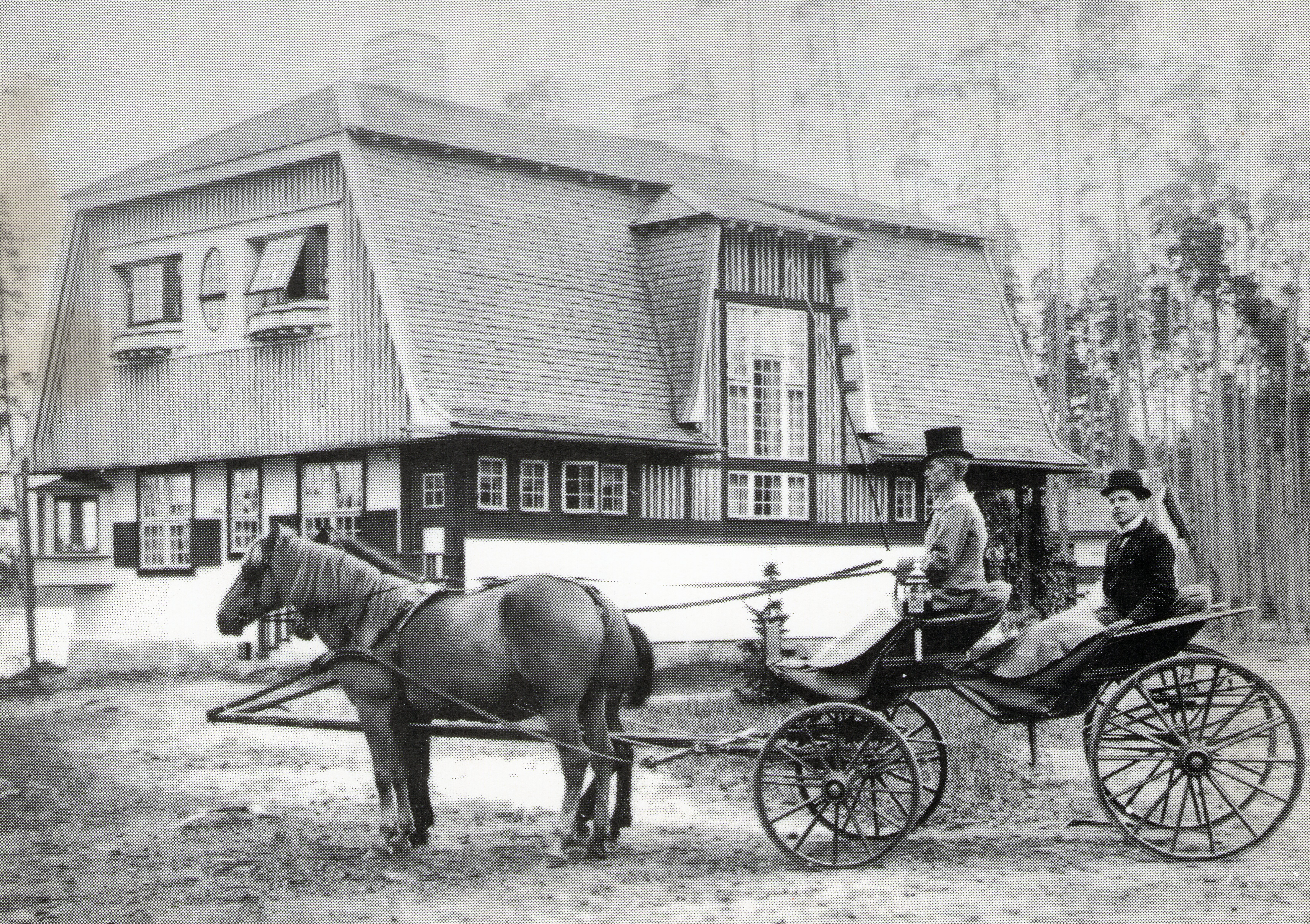 Kuvanveistäjä Emil Cedercreutz taitelijakotinsa Ilmilinnan edustalla Köyliössä vuonna 1911.